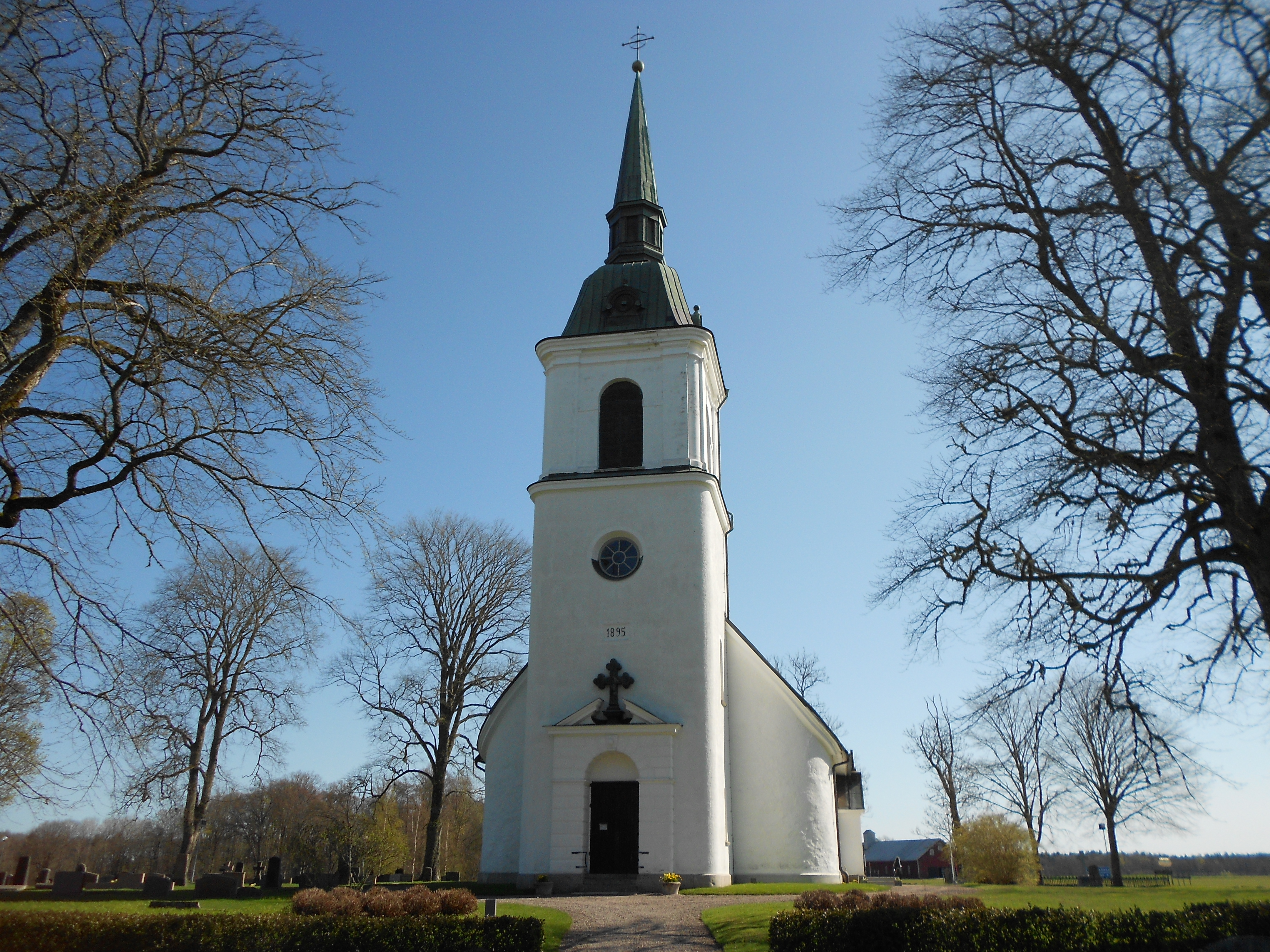 Främmestads kyrka i Västergötland, Sverige